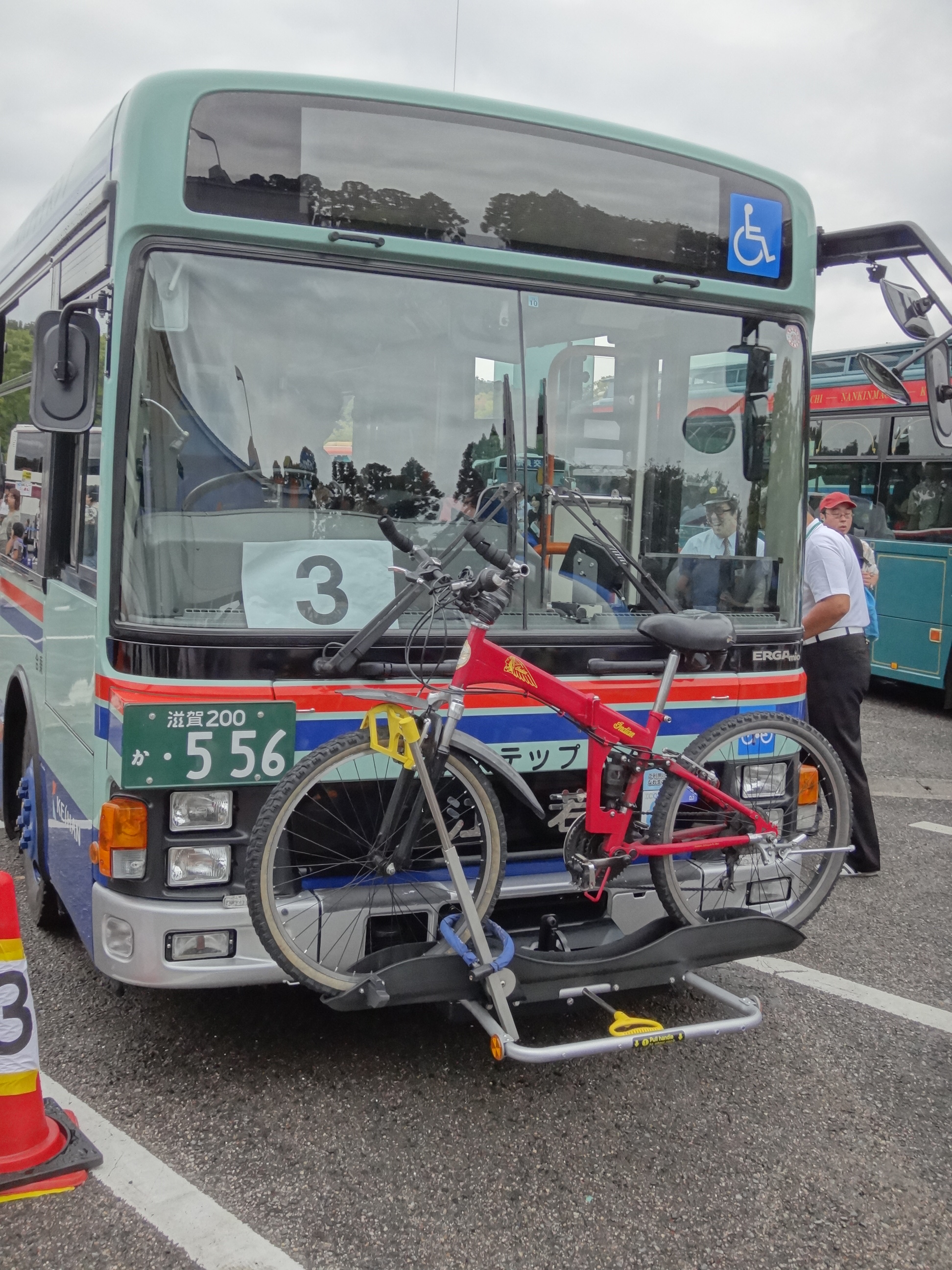 滋賀県の江若交通、自転車が搭載できるバス（いすゞ・エルガミオ） 第12回 スルッとKANSAIバスまつりにて